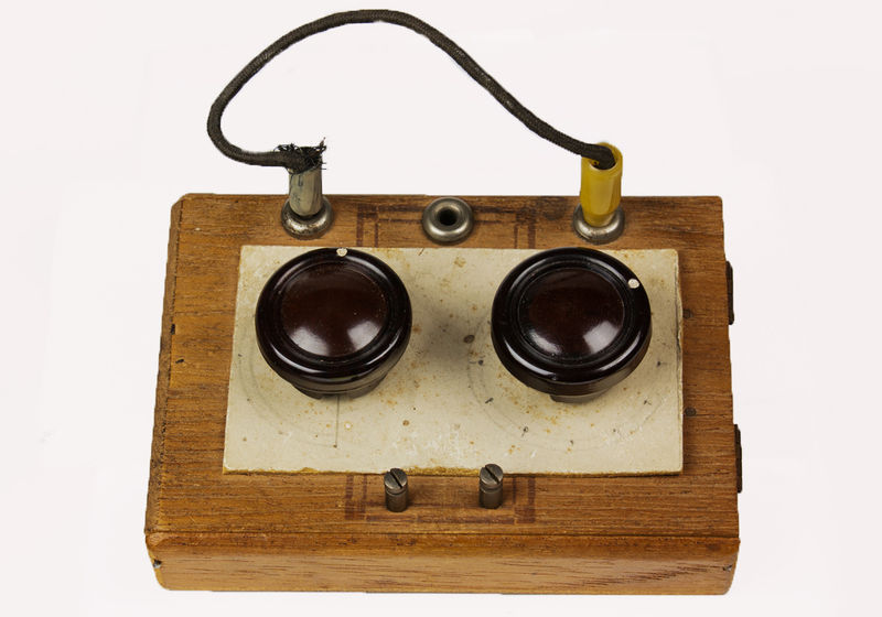 De Moffenzeef werd tijdens de Tweede Wereldoorlog gebruikt om het stoorsignaal van de Duitsers te elimineren om zo naar Radio Oranje te kunnen luisteren.